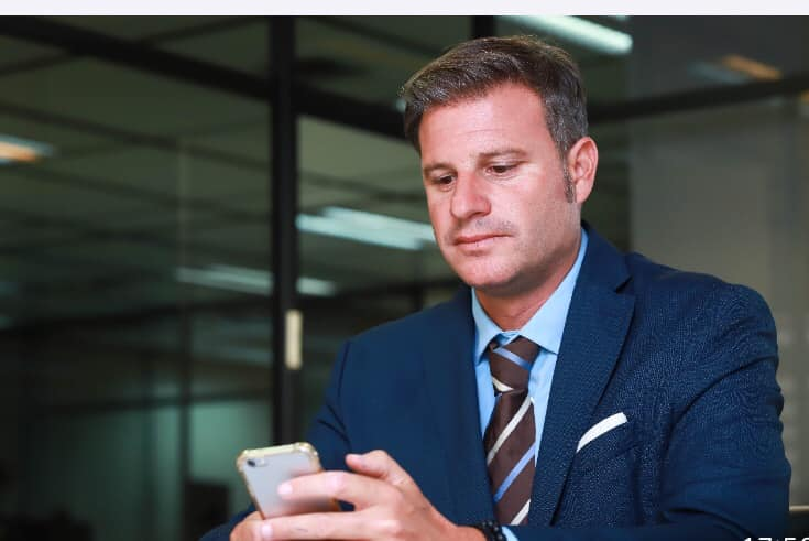 Escribir poesías desde el celular